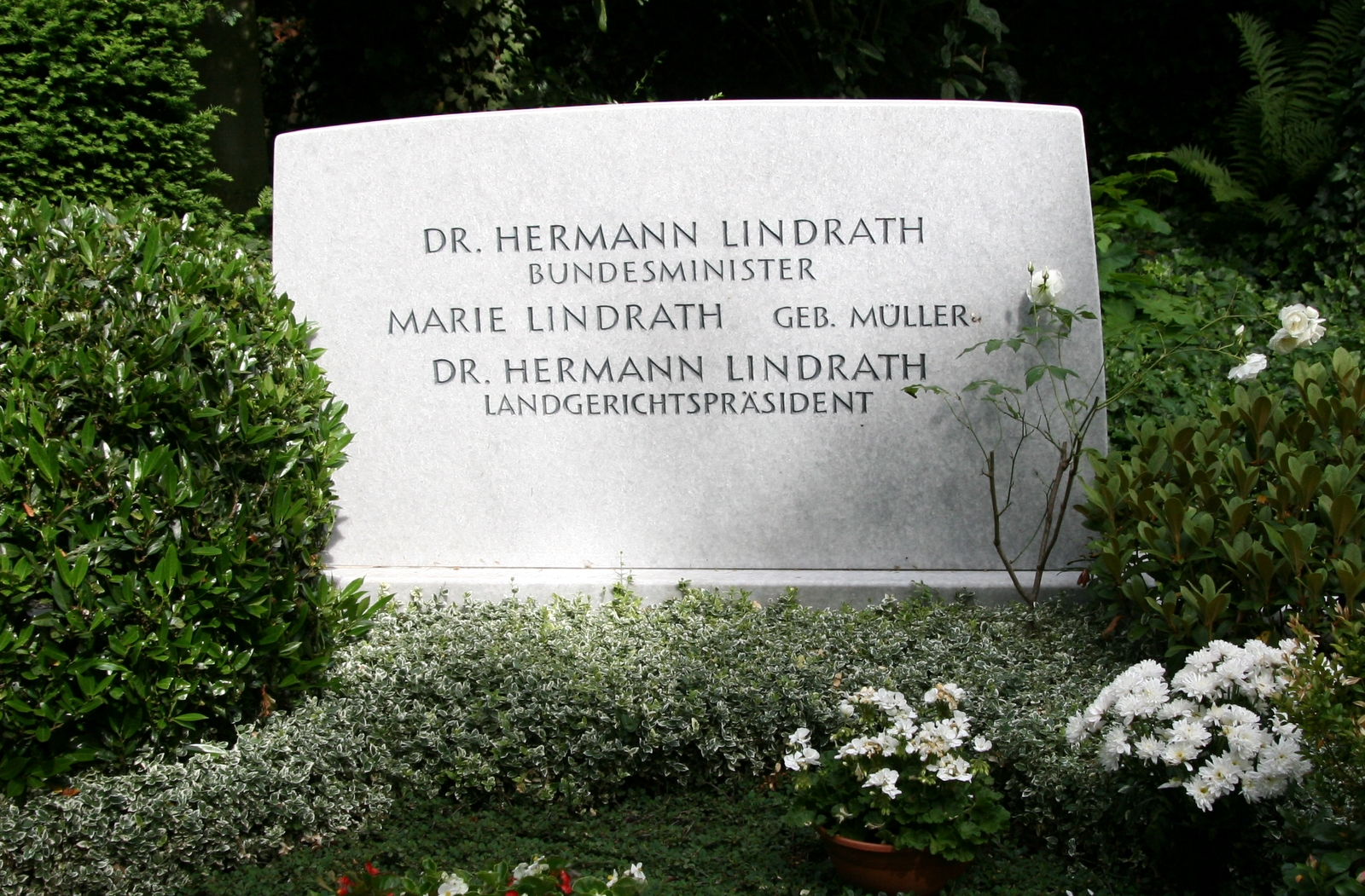 h Lindrath Grab